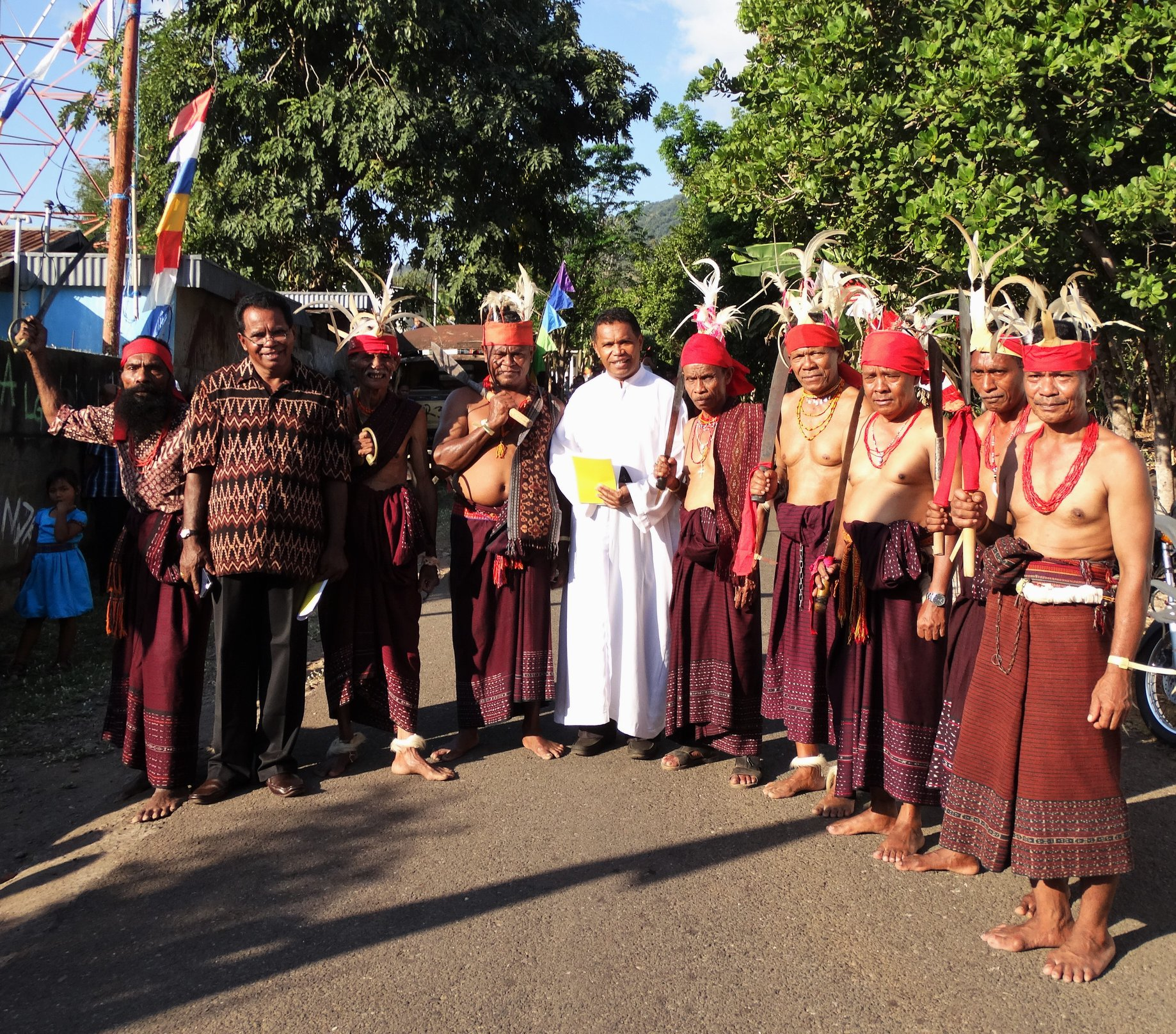 Pastor Paroki Riangkemie bersama penari Lewoloba pada saat kunjungan krisma Uskup Larantuka (September 2018)